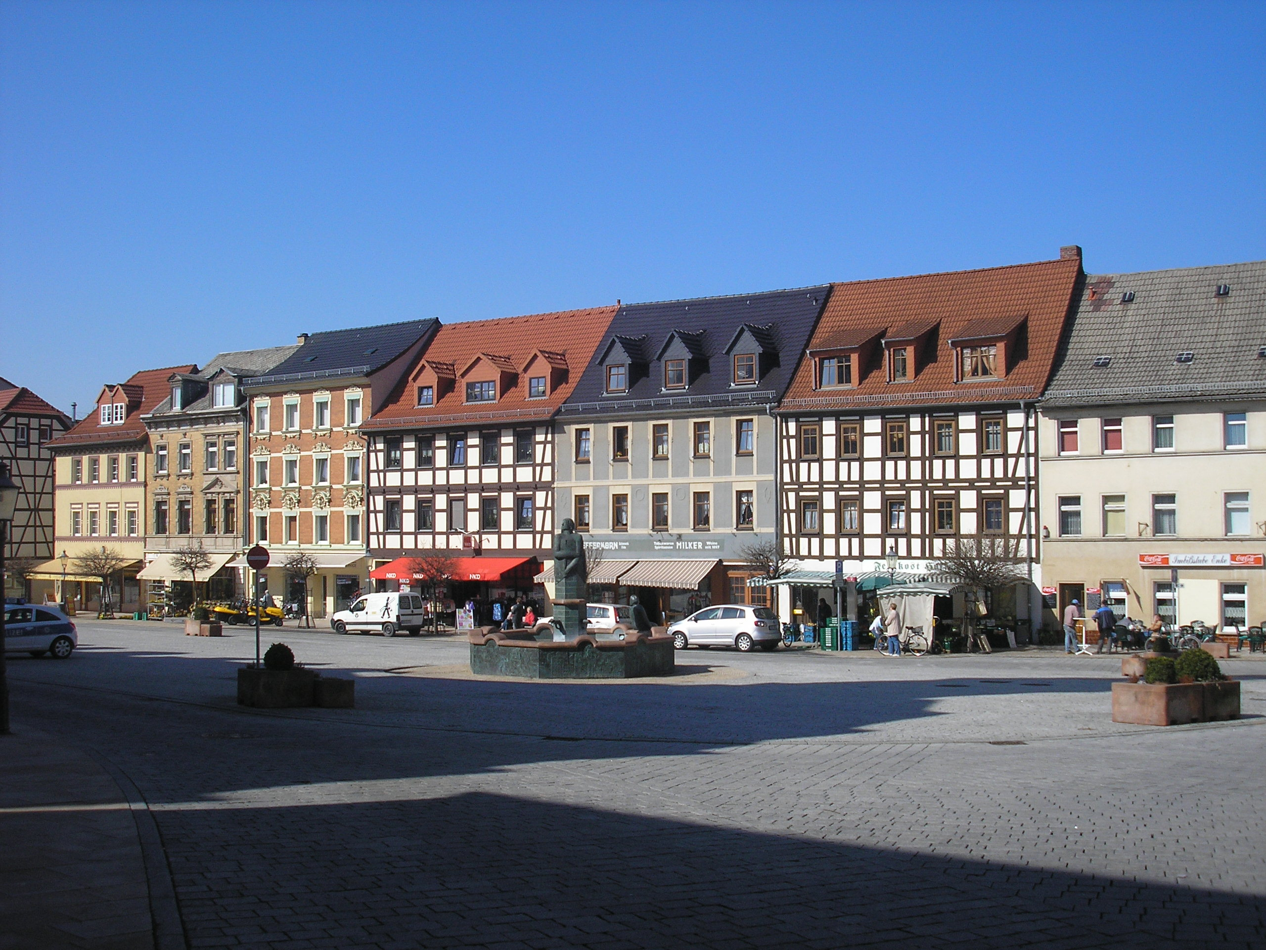 Der Markt in Schmölln (Thüringen).